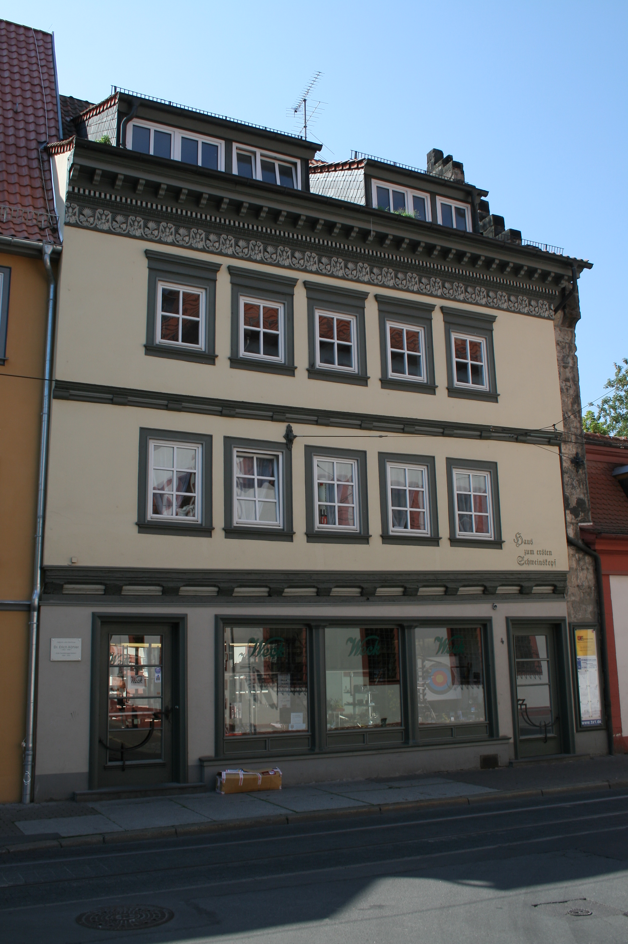 Geburtshaus von Erich Köhler in Erfurt.